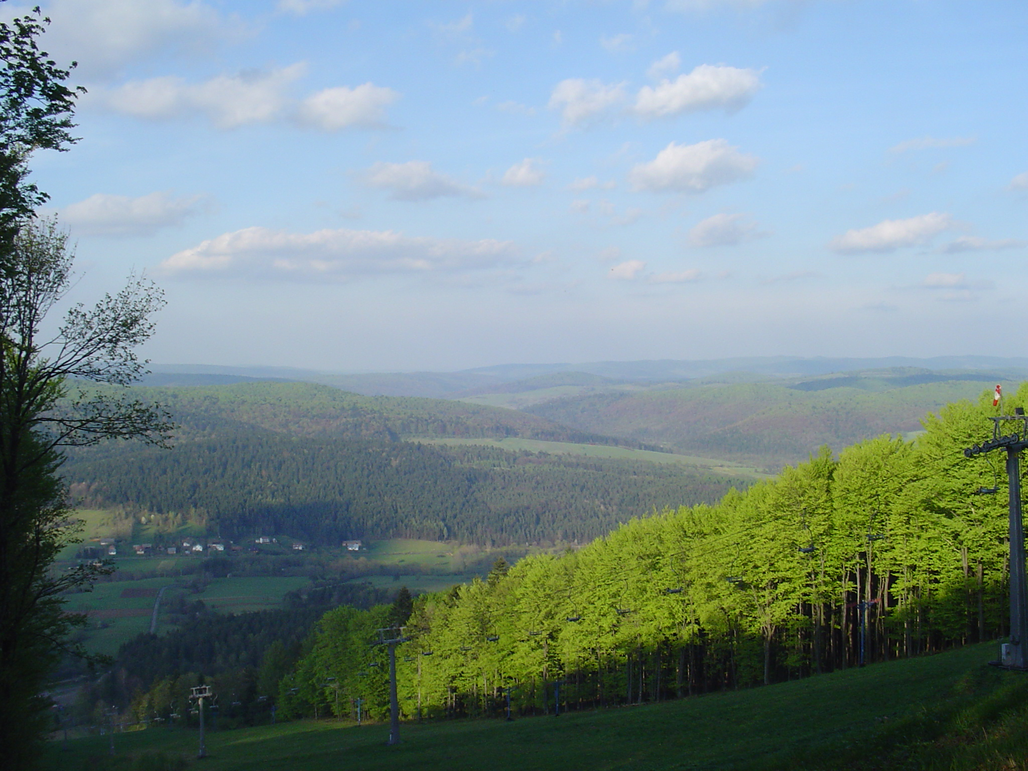 Ustrzyki Dolne, Laworta Wiosna